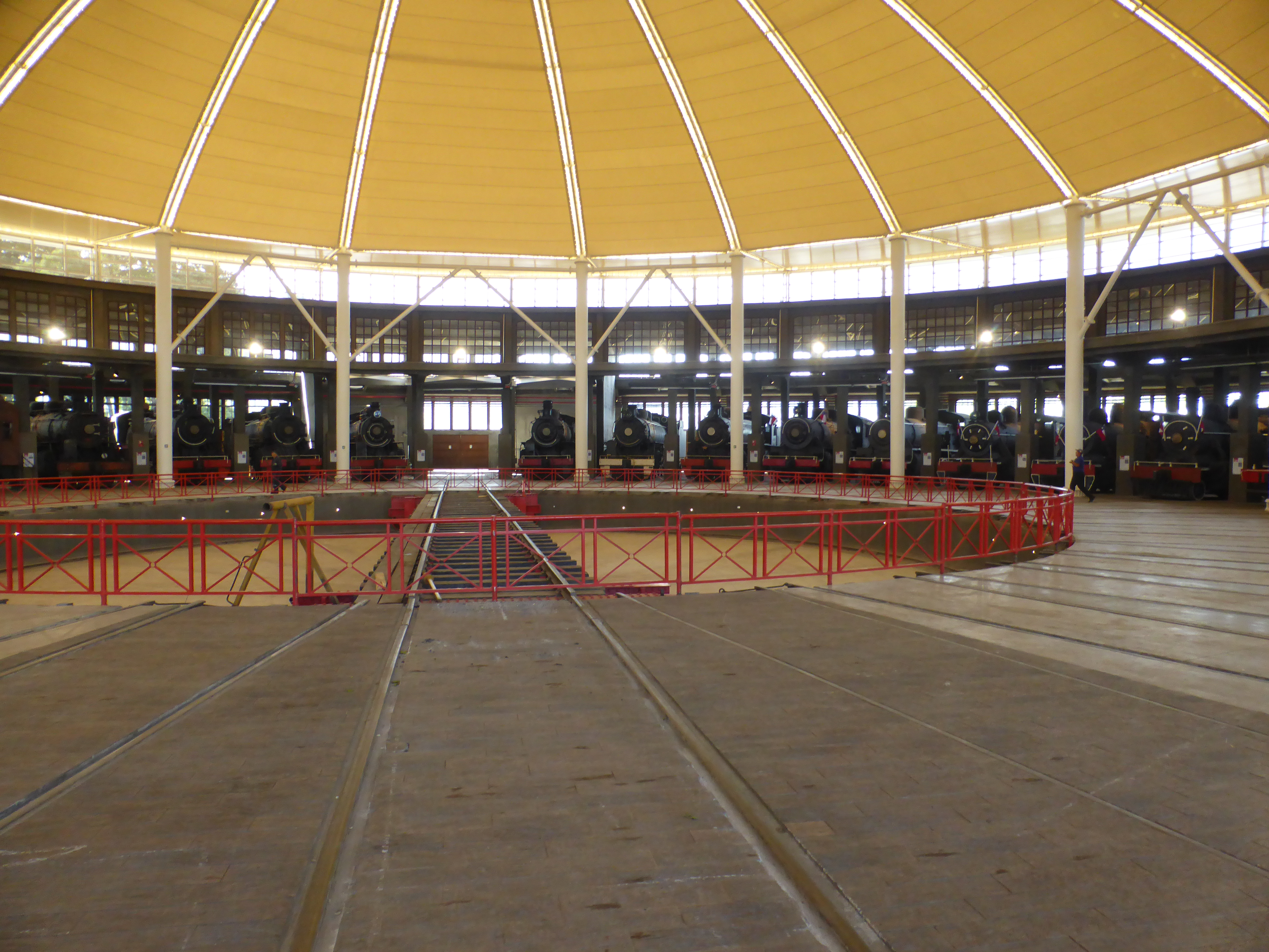 La "Casa de Máquinas de Temuco" ha sido cubierta.